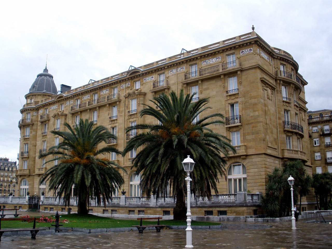 San Sebastian - Hotel Maria Cristina